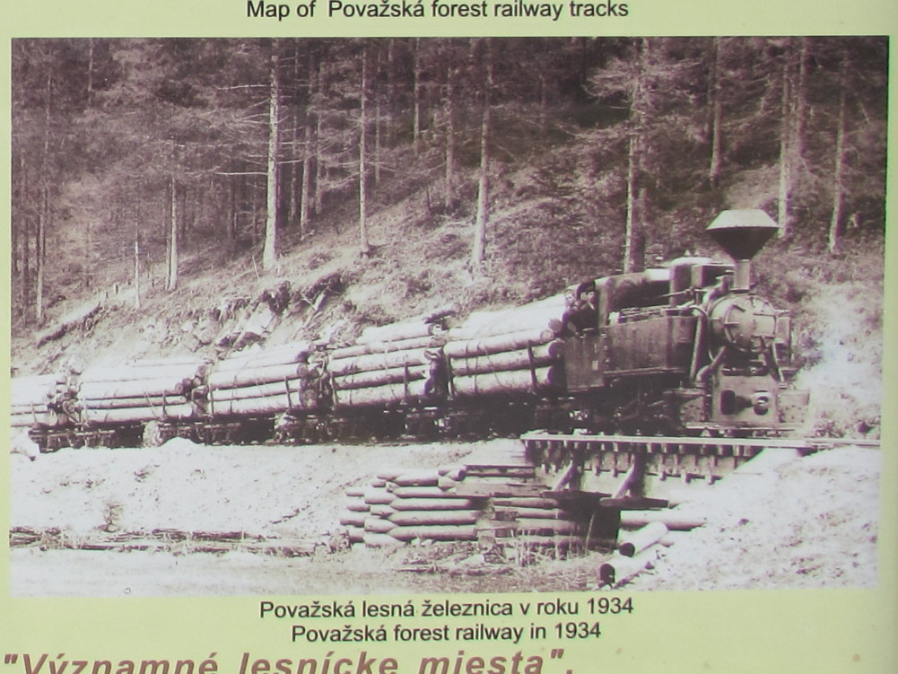 Teilausschnitt einer aufgestellten Informationstafel: Foto Považská lesná železnica